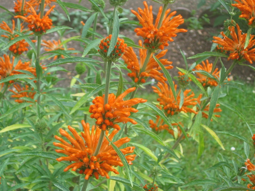 Leonotis leonurus au Jardin des Plantes de Paris.